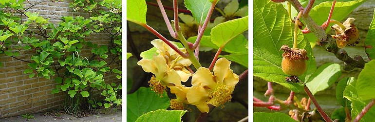 foto's kiwifruit plant, bloem en vrucht (foto's Wouter Hagens)